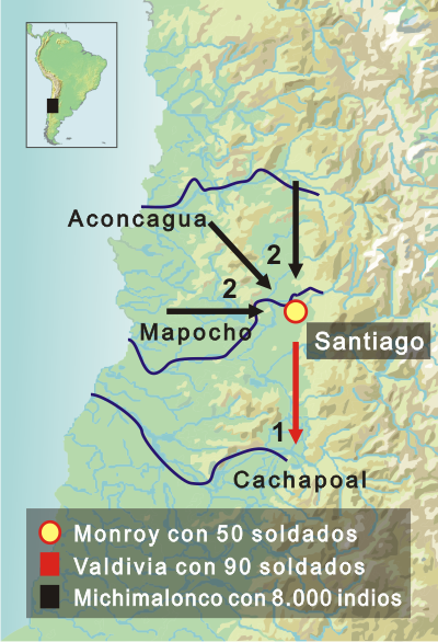 El Ataque de Michimalonco, incendio de Santiago